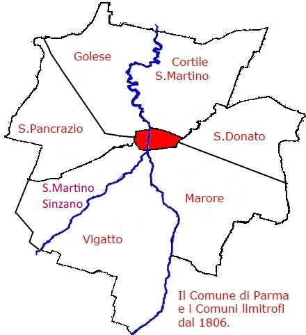 Territori dei Comuni fuori le mura di Parma dal 1806